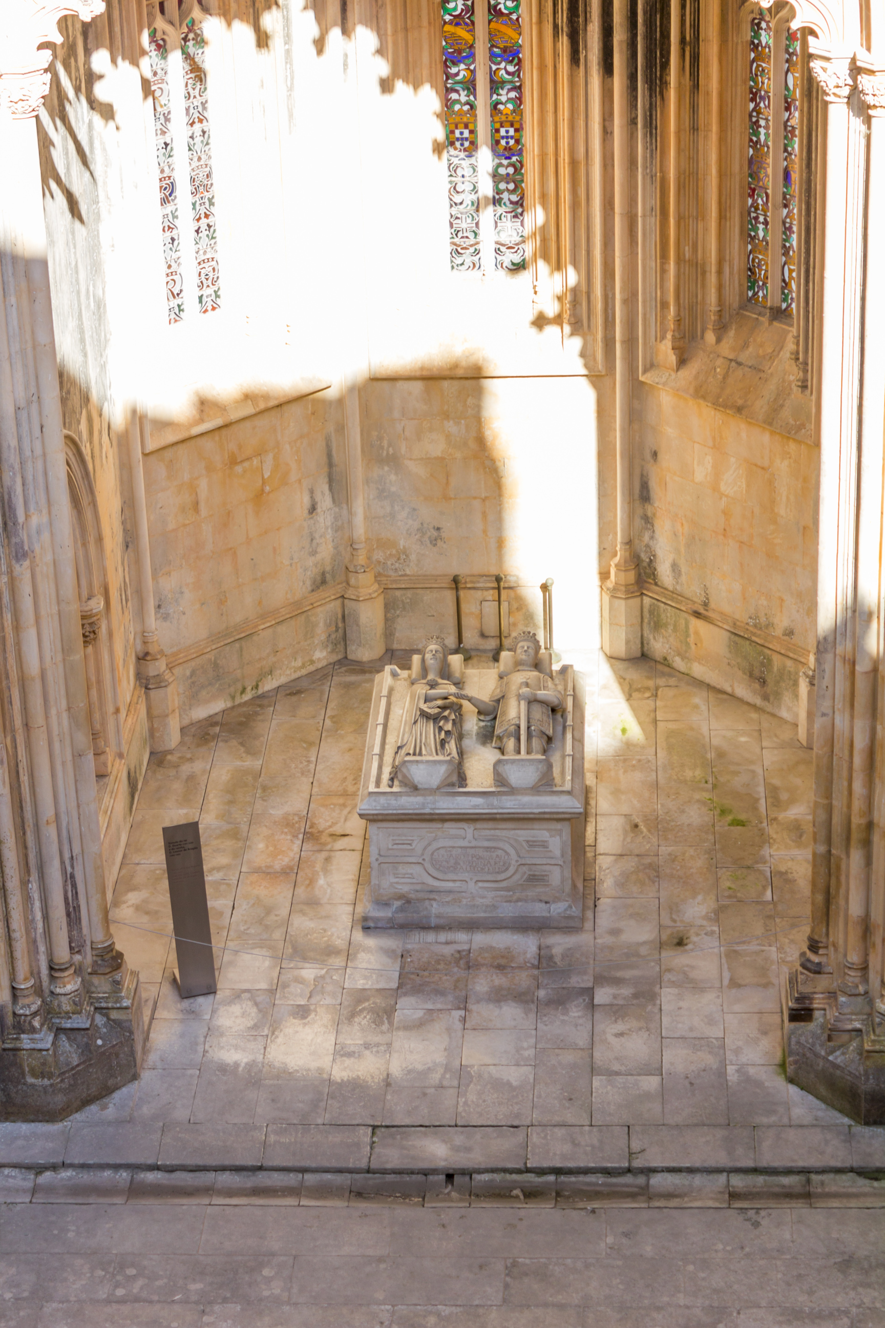 Batalha-Monastery-101